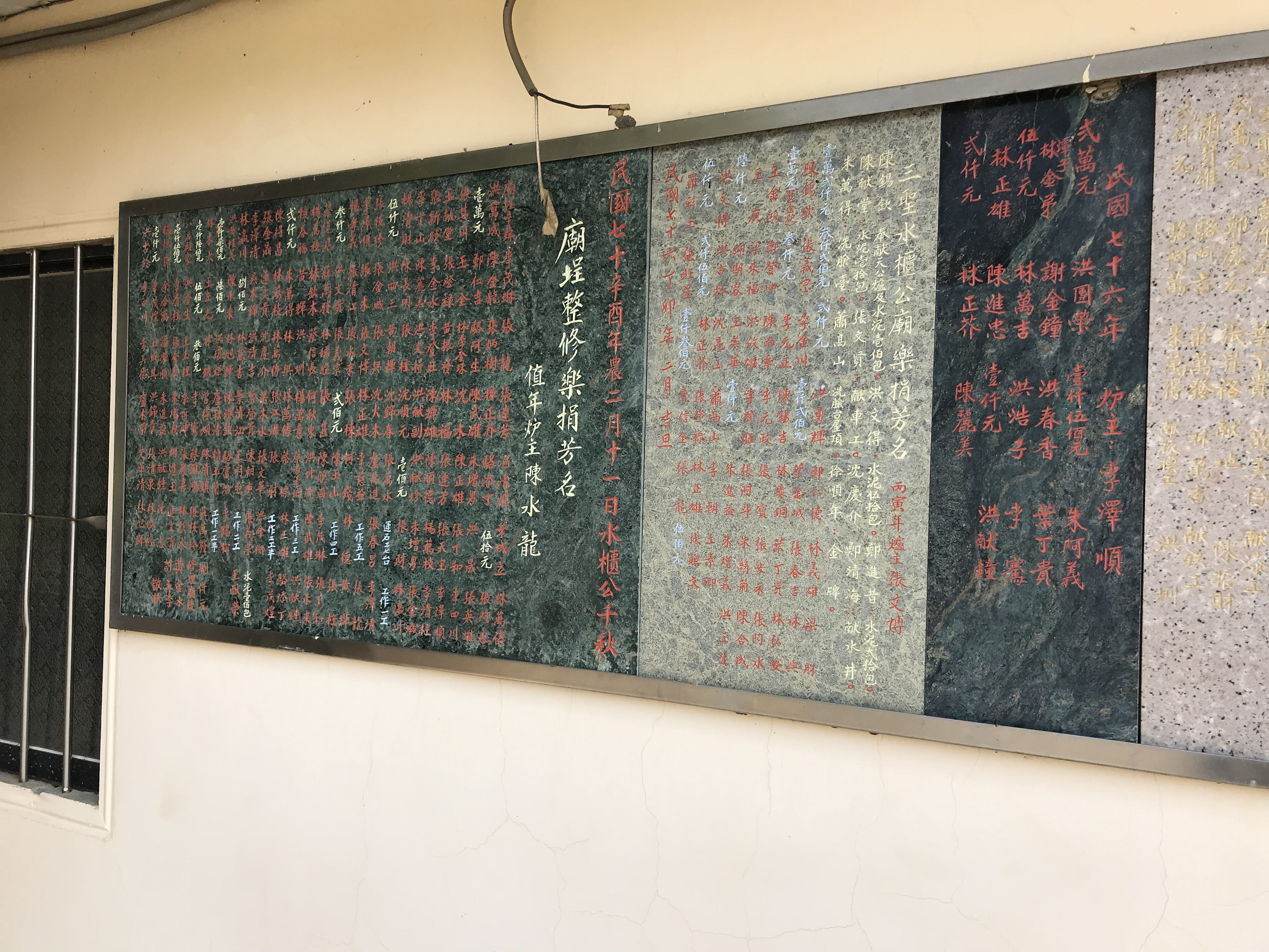 三聖水櫃公廟樂捐名單